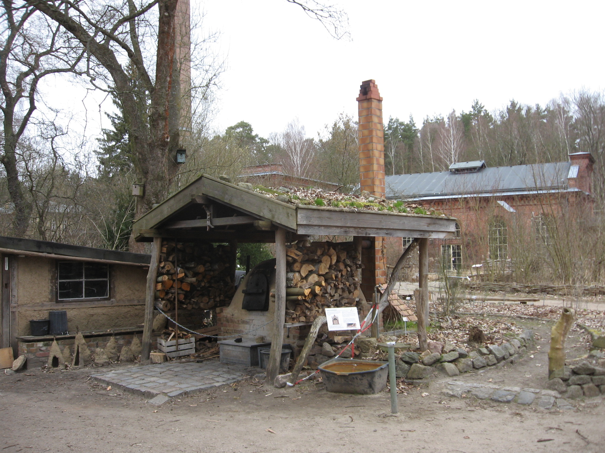 Lehmbackofen des Ökowerk Teufelssee; im Hintergrund Pumpengebäude.